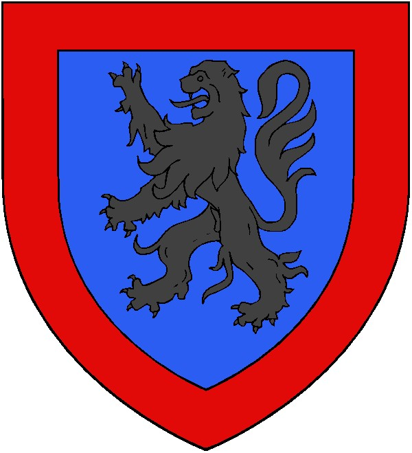 Armoiries d'Antoine Dubois lui venant de son père